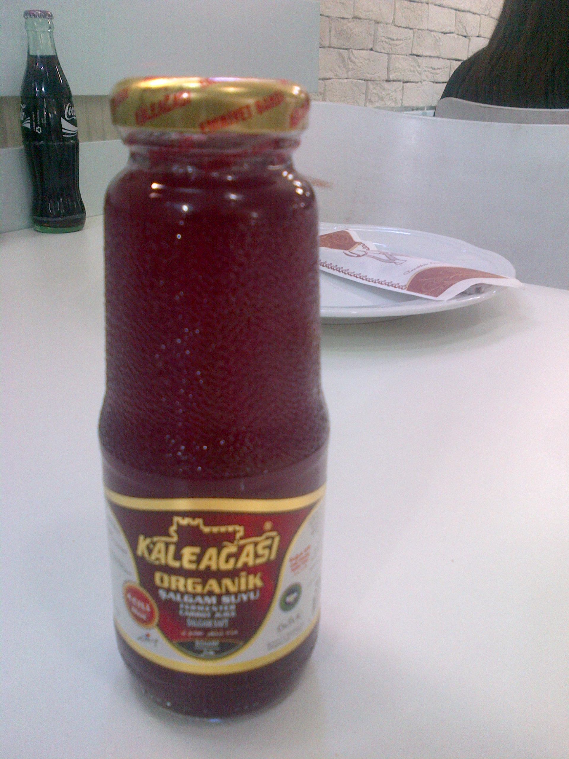 "Şalgam suyu" de la cocina turca, organico.